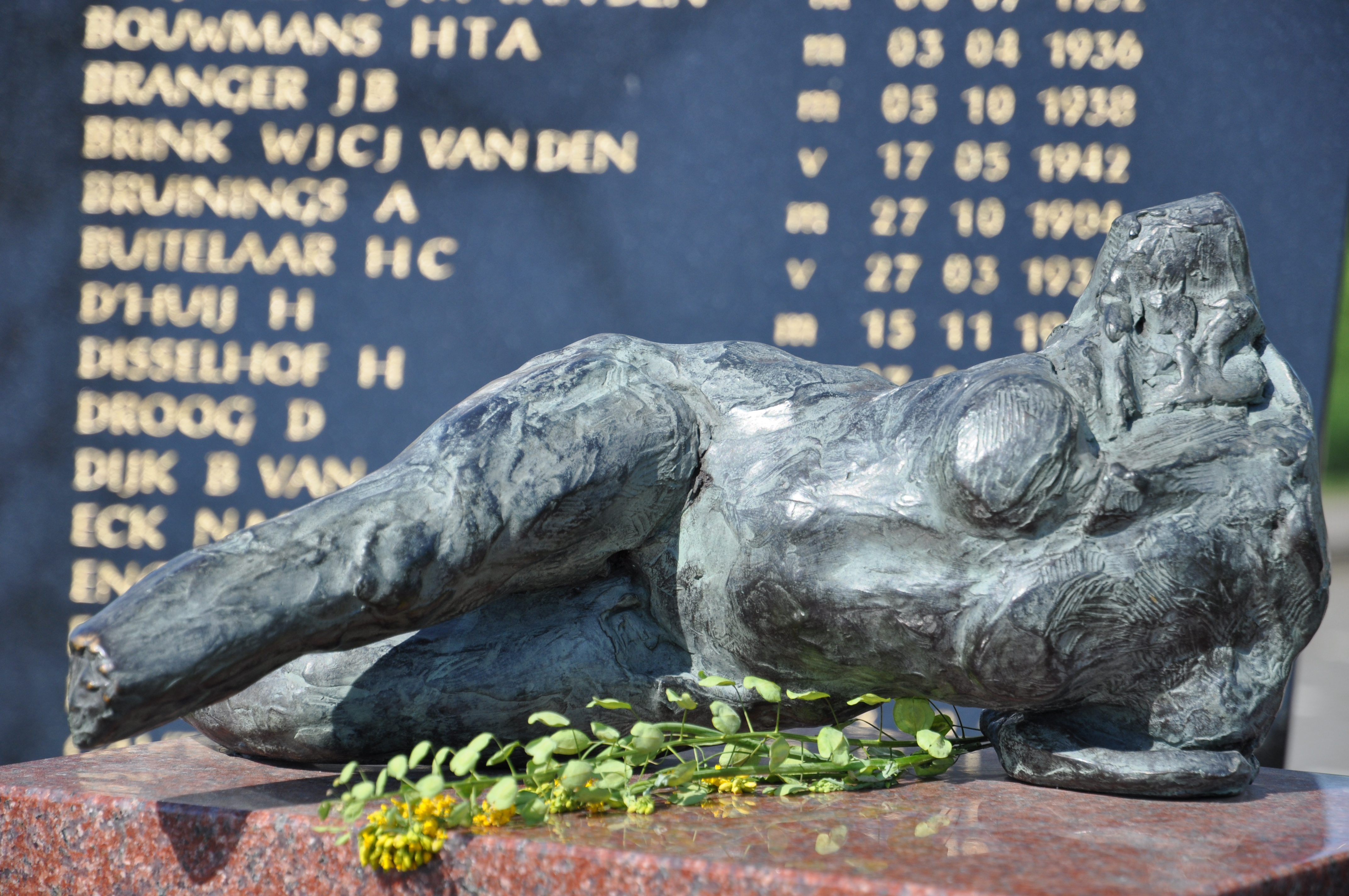 Monument voor de slachtoffers van de treinramp nabij Harmelen, onthuld op 8 januari 2012 door Pieter van Vollenhoven, exact 50 jaar na de ramp. Monument is ontworpen door Taeke de Jong. Van de betreffende Wikipediapagina: "Het ontwerp bestaat uit twee hardstenen platen die scheef ten opzichte van elkaar staan en waarop de 93 namen van de slachtoffers staan. Tussen de platen door is de plek des onheils te zien. Tussen de platen staat een sokkel in rode hardsteen, met daarop een corpus dat de slachtoffers verbeeldt." Het monument staat permanent aan de openbare weg en is gefotografeerd zoals het zich aldaar bevindt.